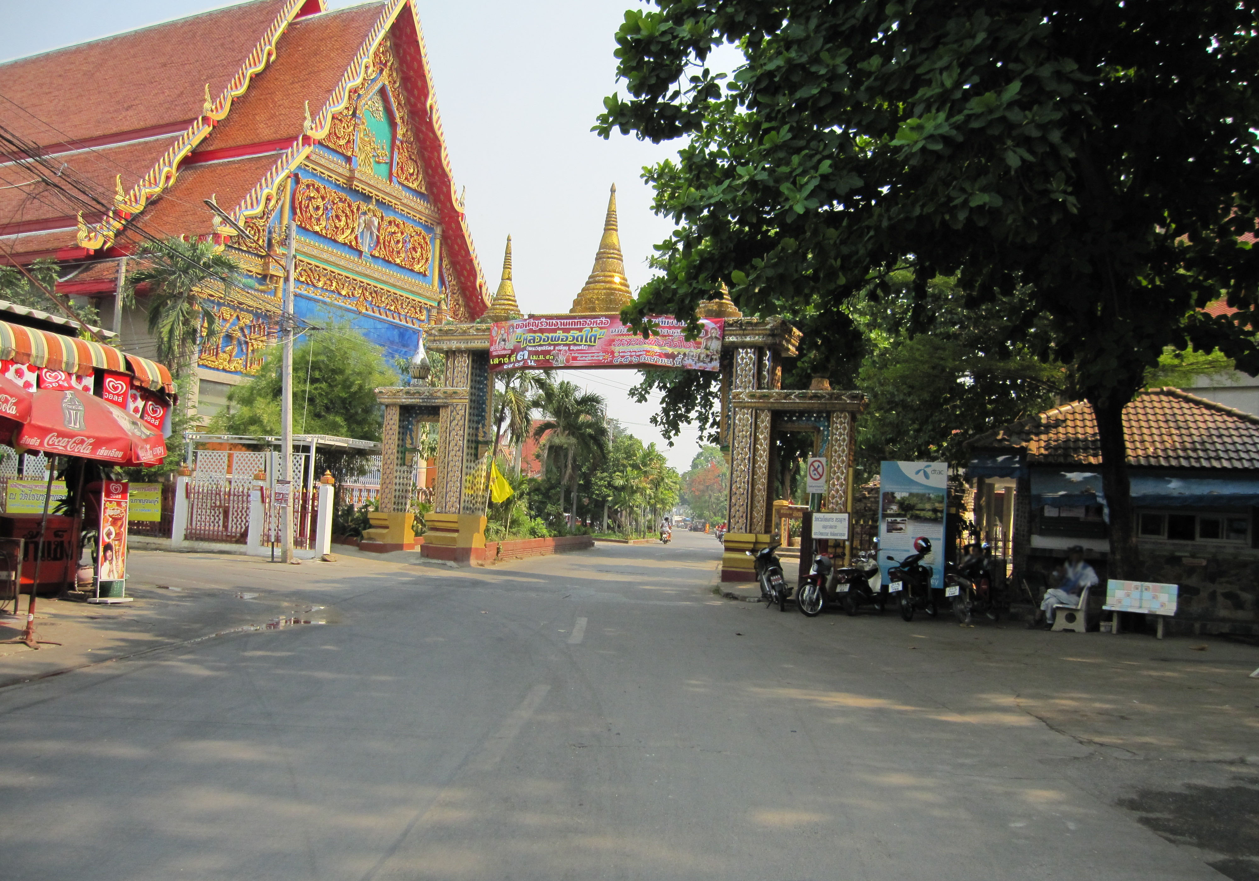 Wat Chaichumphon